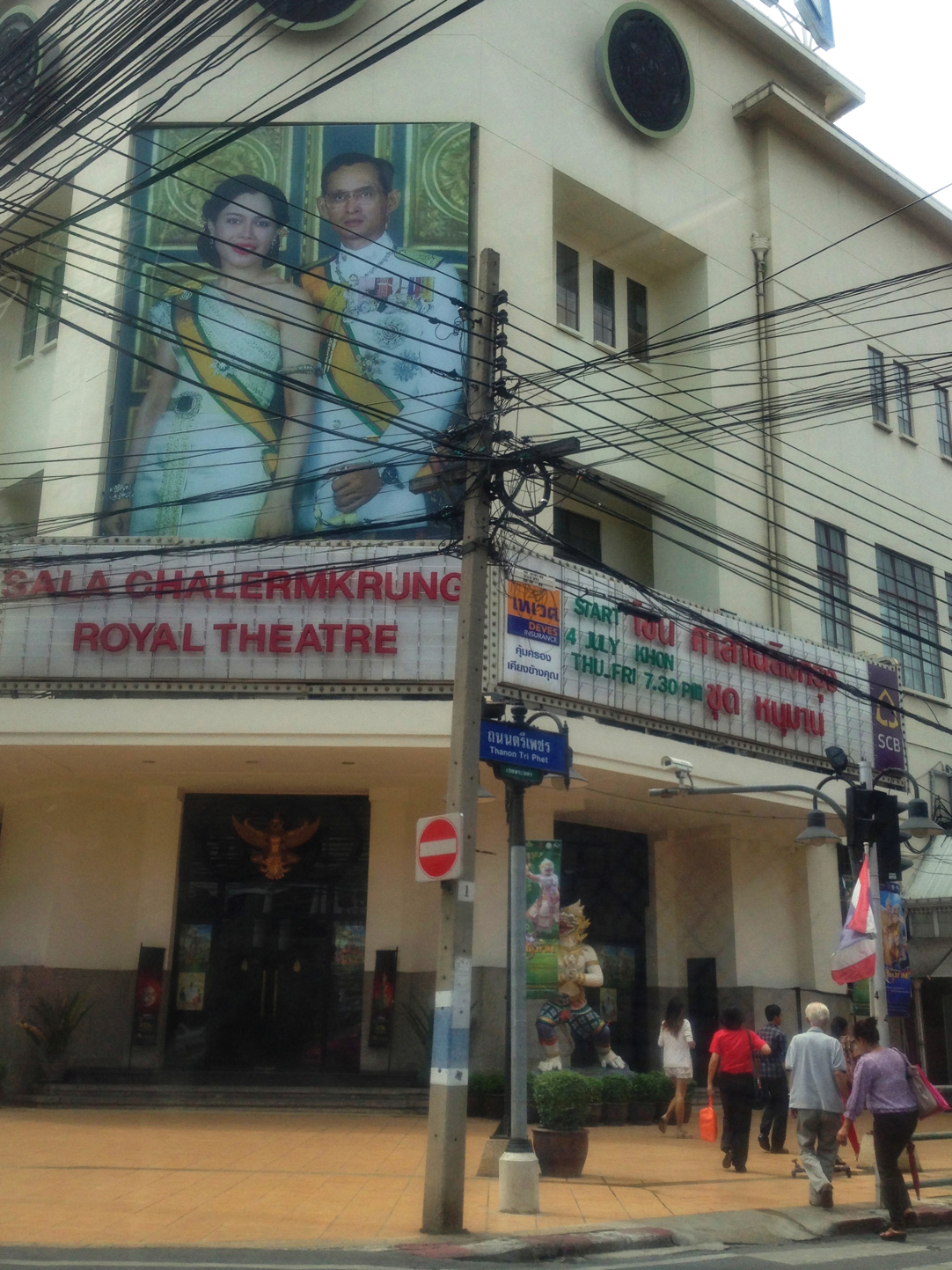 Sala Chalermkrung Royal Thetre, Wang Burapha Phirom,Phra nakhon, Bangkok